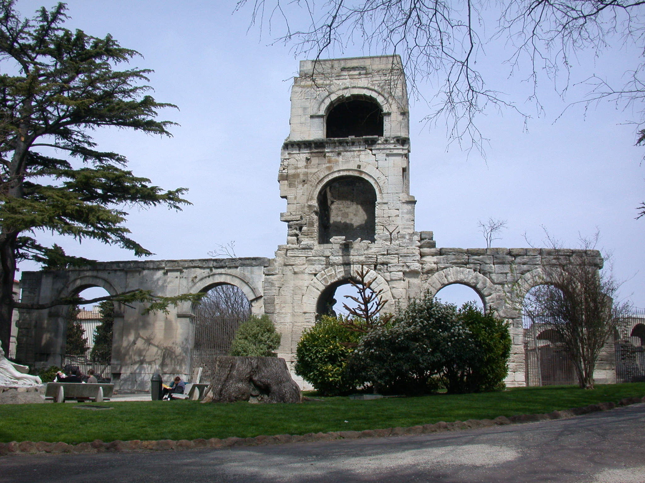 Arles (Francia), teatro romano, resti della facciata esterna. Foto personale aprile 2005